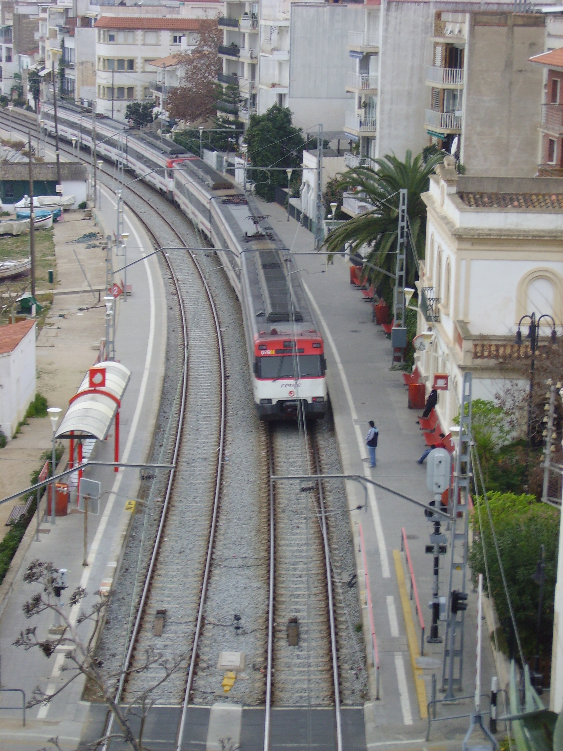 Estació de Sant Pol de Mar, El Maresme, Catalunya.